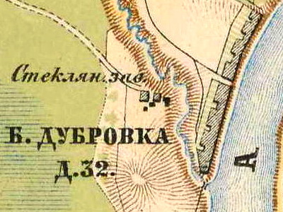 Стеклянный завод на месте будущей мызы Кинь-Грусть